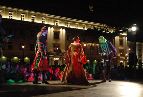 Lubelski Zespół Belriguardo podczas Nocy Kultury 2007